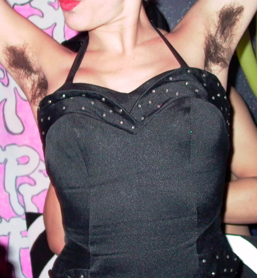 Underarm Hair